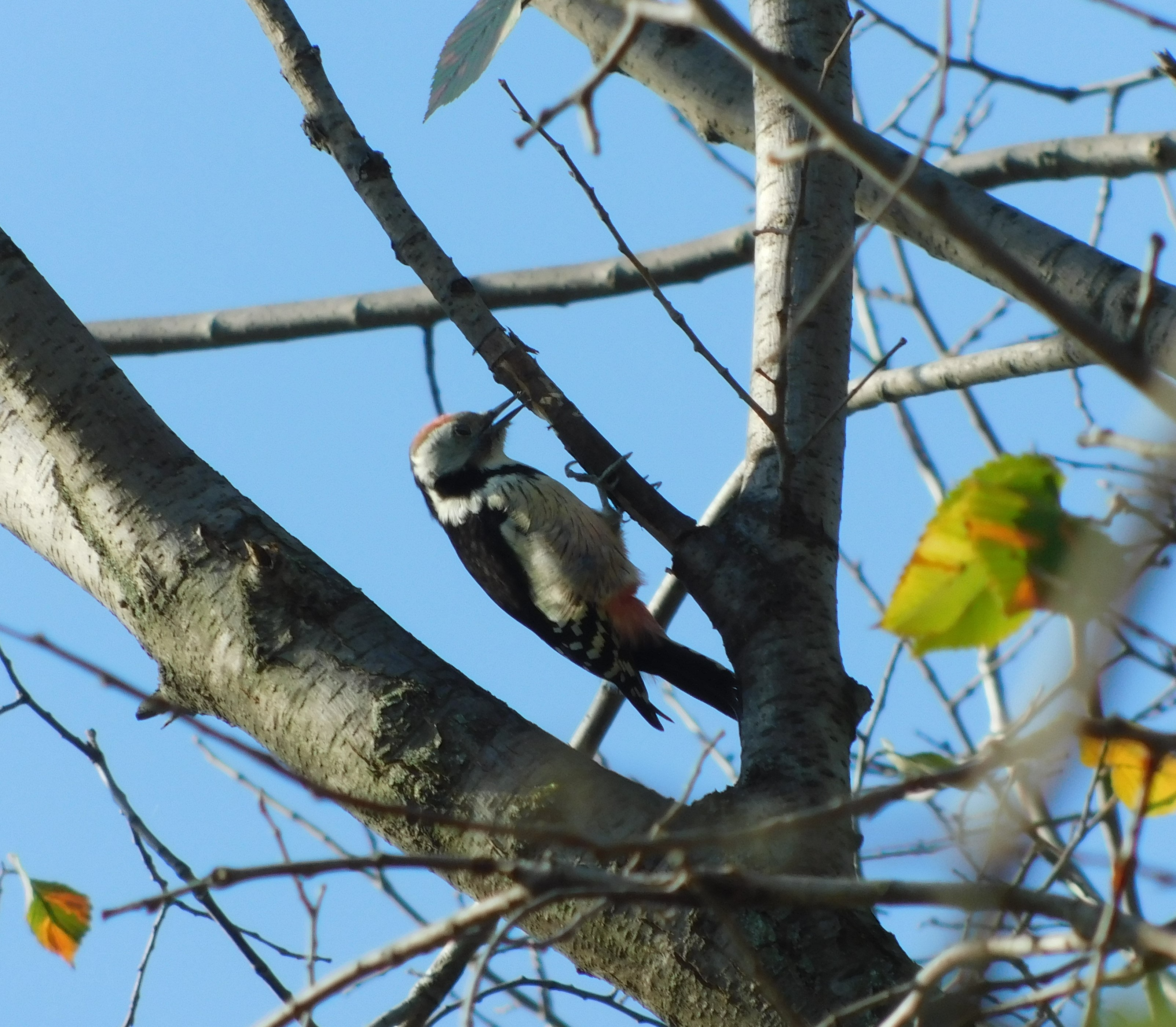 Srpski (latinica): Areal obuhvata centralnu Evropu, Pirineje, Balkansko poluostrvo, Kavkaz i deo Male Azije. Stanarica je. Gnezdi se u starim svetlim listopadnim šumama, posebno hrastovim i grabovim, voćnjacima i mozaičnim predelima od ravnica do planinskog pojasa četinara. Jaja polaže u duplje u drveću koje sam pravi. Ishrana se sastoji od insekata i larvi koje pronalazi ispod kore drveća. Evropska populacija je stabilna. U Srbiji se gnezdi 4.500–7.500 parova, uz opadajući trend (Puzović et al 2009). - BioRaS